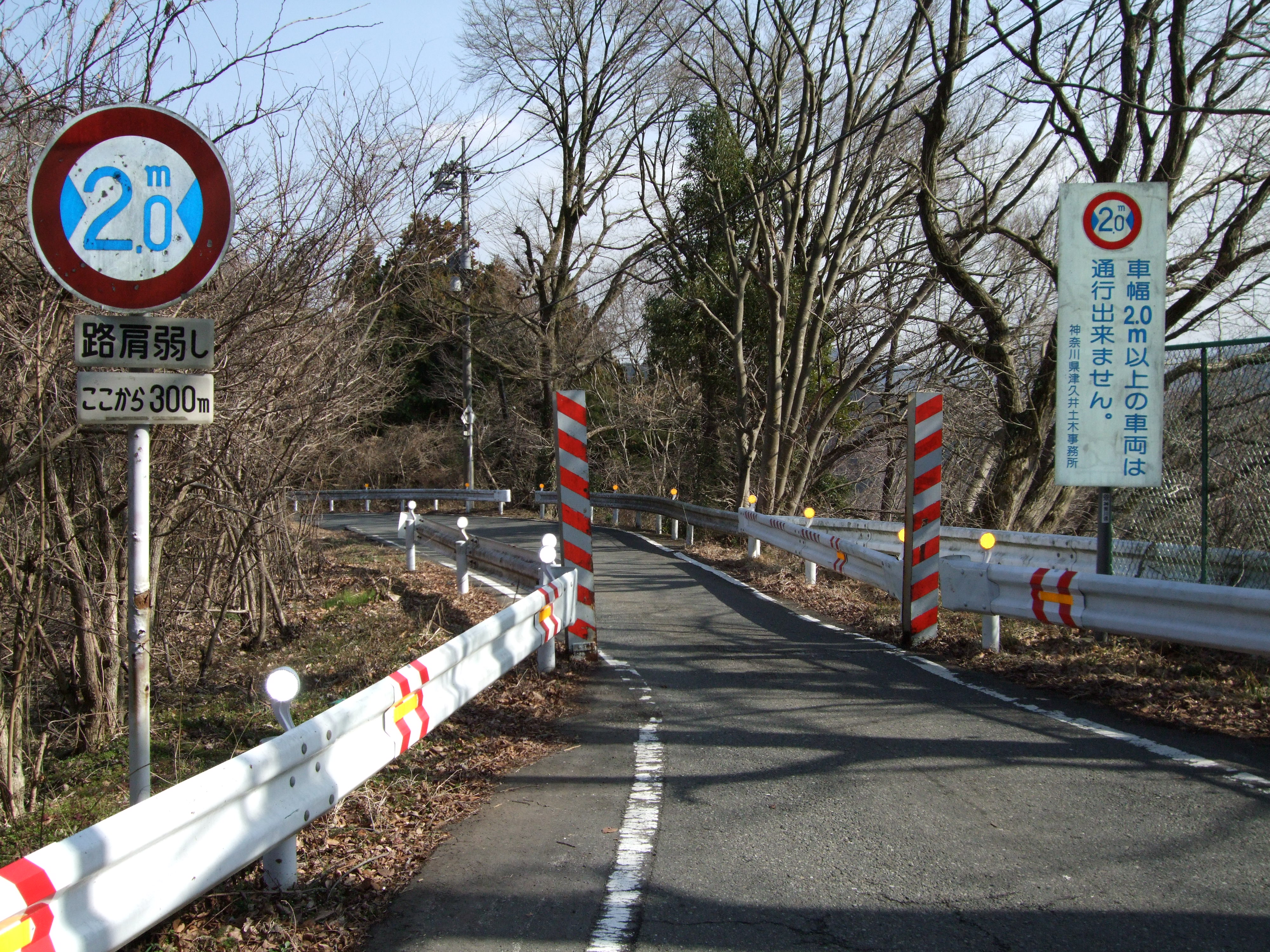 Makiba-pass1